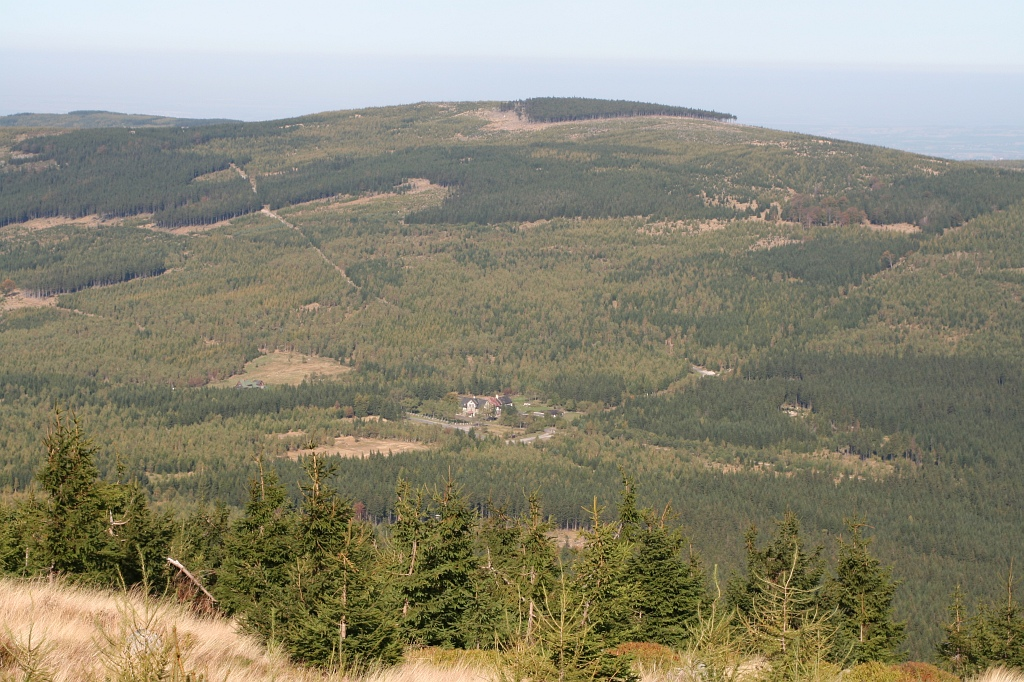 Kamienica i Rozdroże Izerskie widziane ze Zwaliska (od południa)